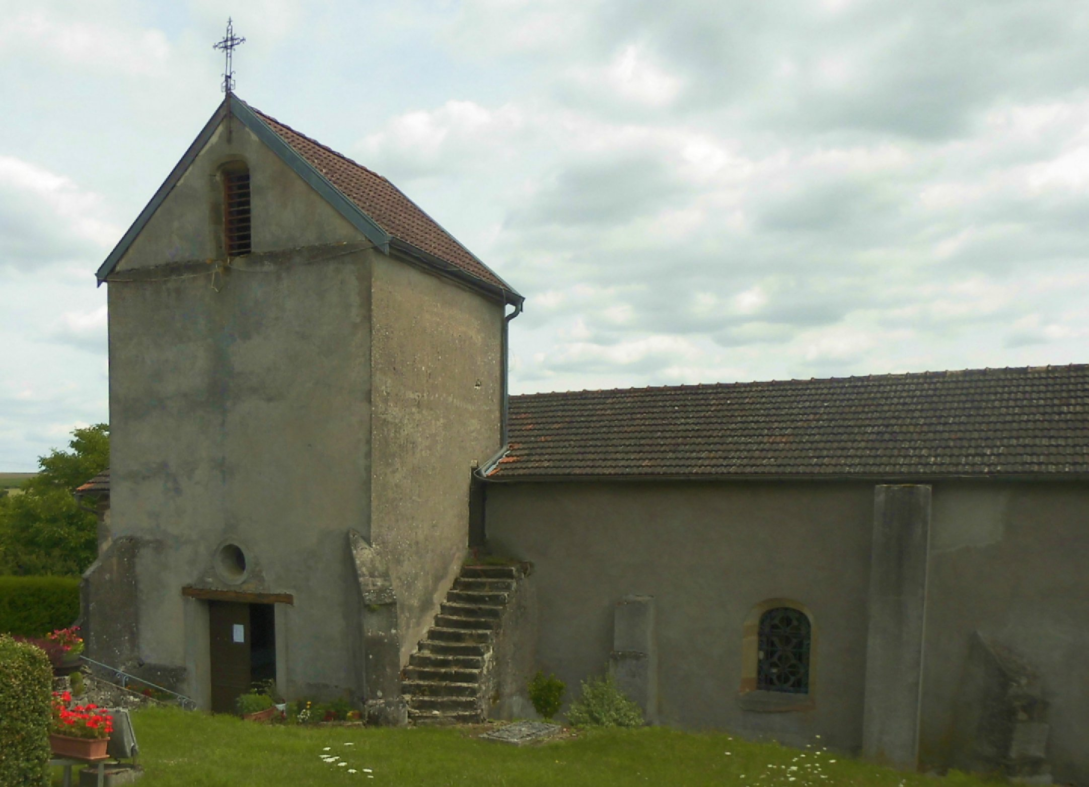 L'église Saint-Valbert de Lironcourt